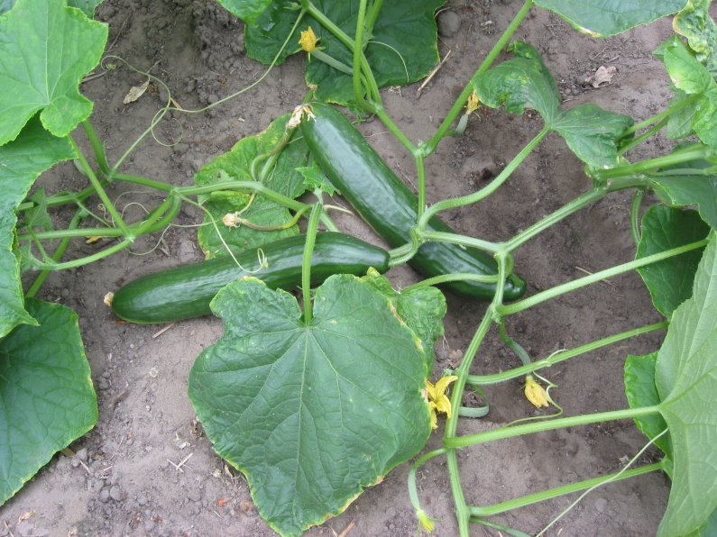 zelfgemaakte foto van komkommerplant; begin juni